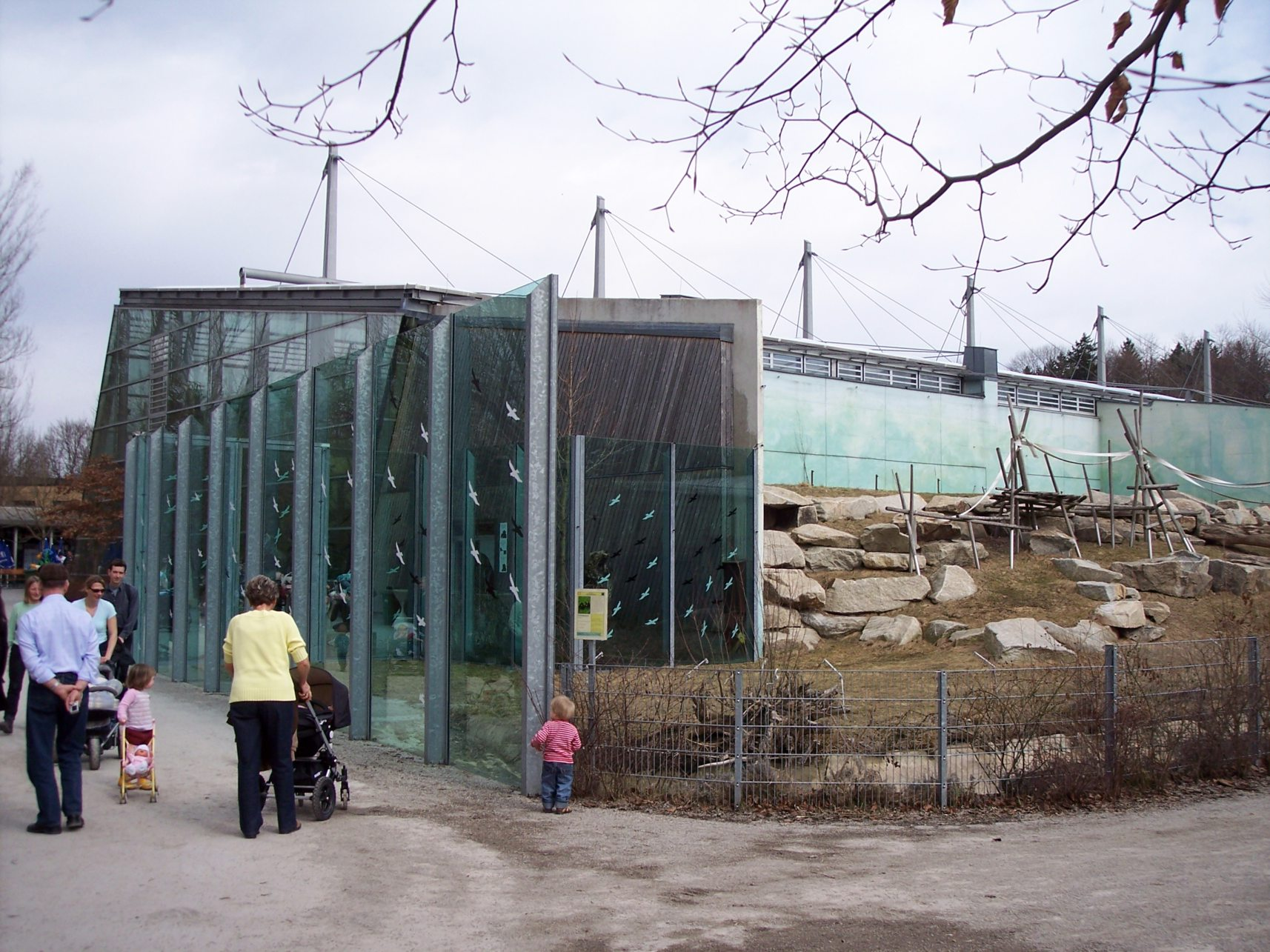 Das neue Urwaldhaus im Tierpark Hellabrunn, München, fotografiert am 27.03.2006 von mir The new jungle house in Hellabrunn zoo in Munich, Germany, picture taken March 27, 2006